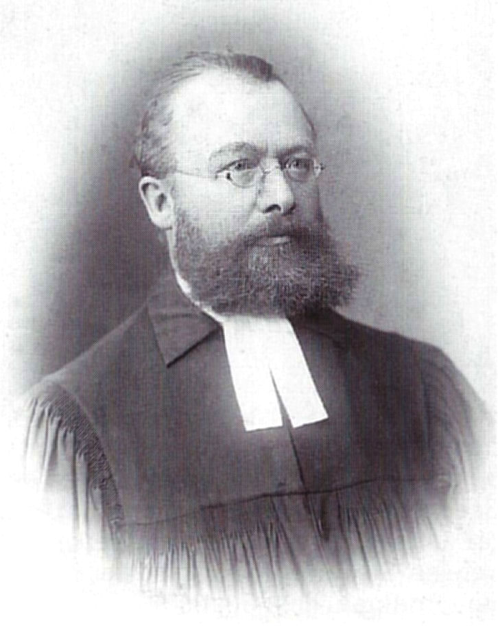 Porträtfotografie von Pastor Eberhard Cronemeyer